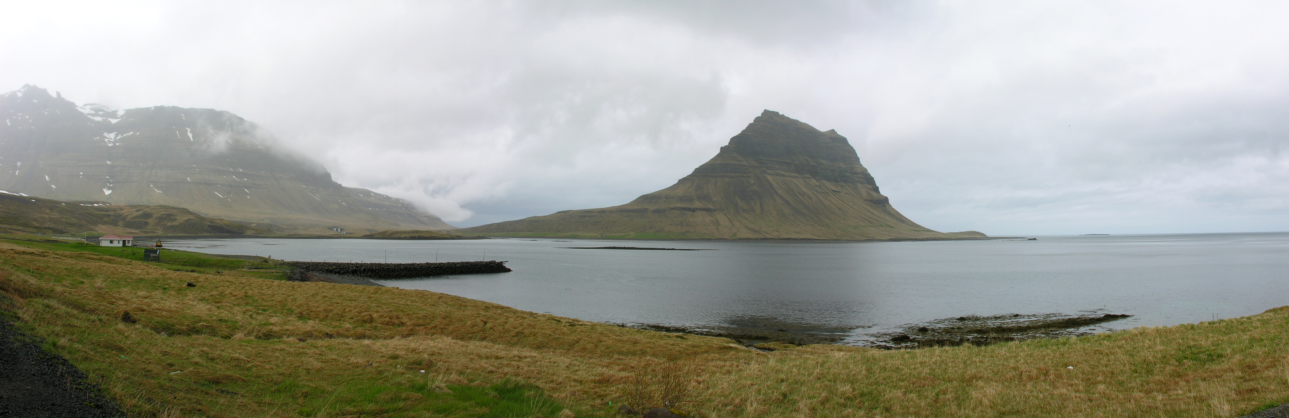 Iceland, Kirkjufell at Grundarfjörður